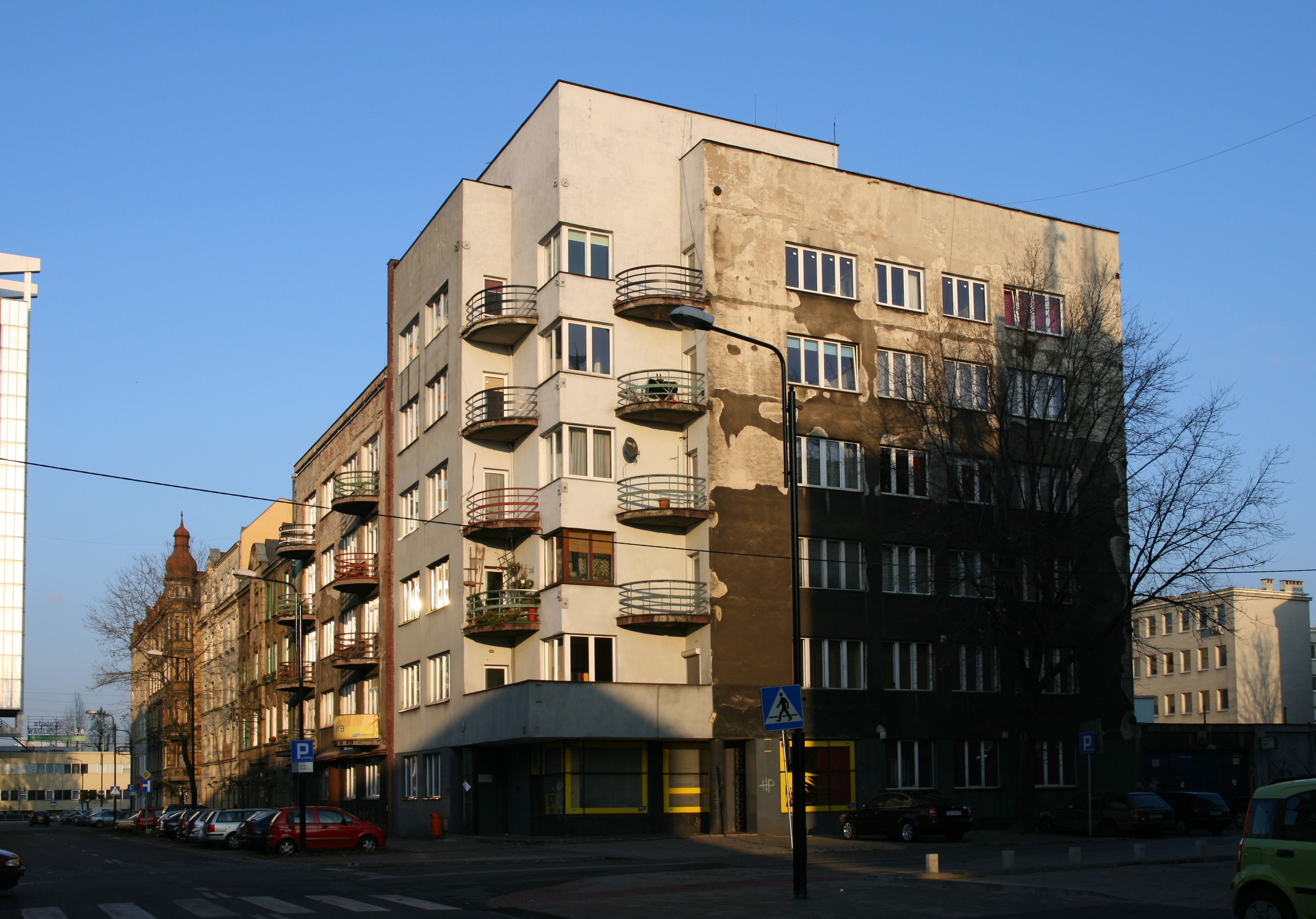 Modernistyczny 6-kondygnacyjny budynek mieszkalny prawdopodobnie z 1938 r. przy ul. Jana III Sobieskiego 8a (róg z ul. Opolską) w Katowicach.